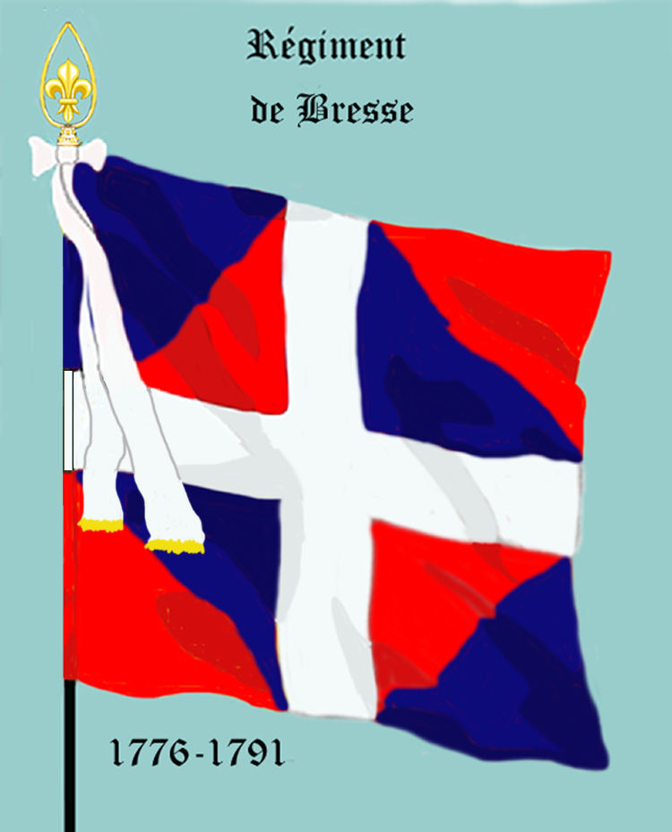 Ordonnanzfahne eines königlich französischen Infanterie-Regiments. - Entnommen und überarbeitet aus: „LES UNIFORMES ET LES DRAPEAUX DE L'ARMÉE DU ROI“ Marseille 1899. (Drapeau d'Ordonnance d' un régiment française d'infanterie royale.)